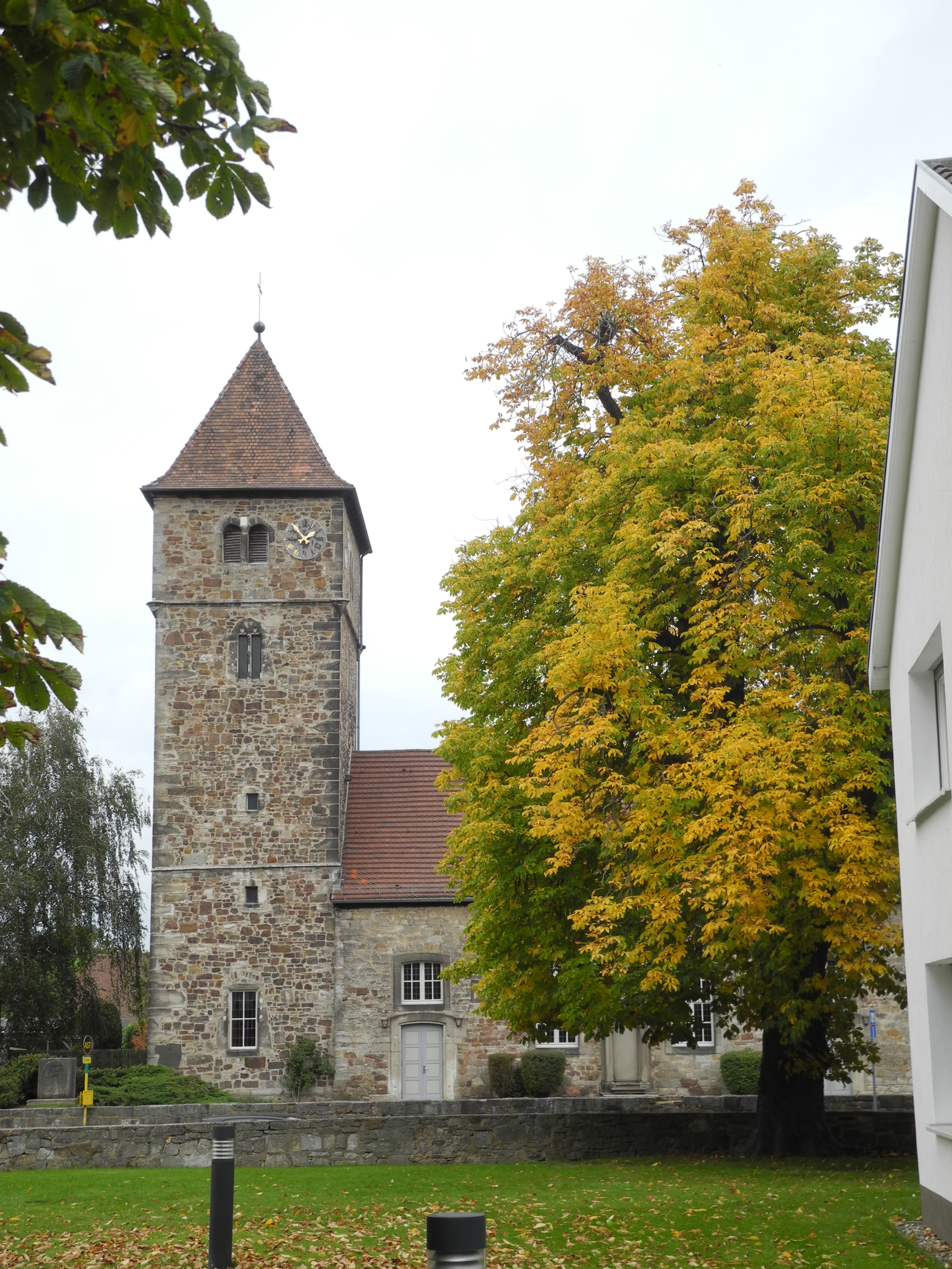 Naturdenkmal in Kassel 611.059. "1 Rosskastanie" (Aesculus hippocastanum) - Bergshäuser Straße, südlich gegenüber der Kirche Waldau.